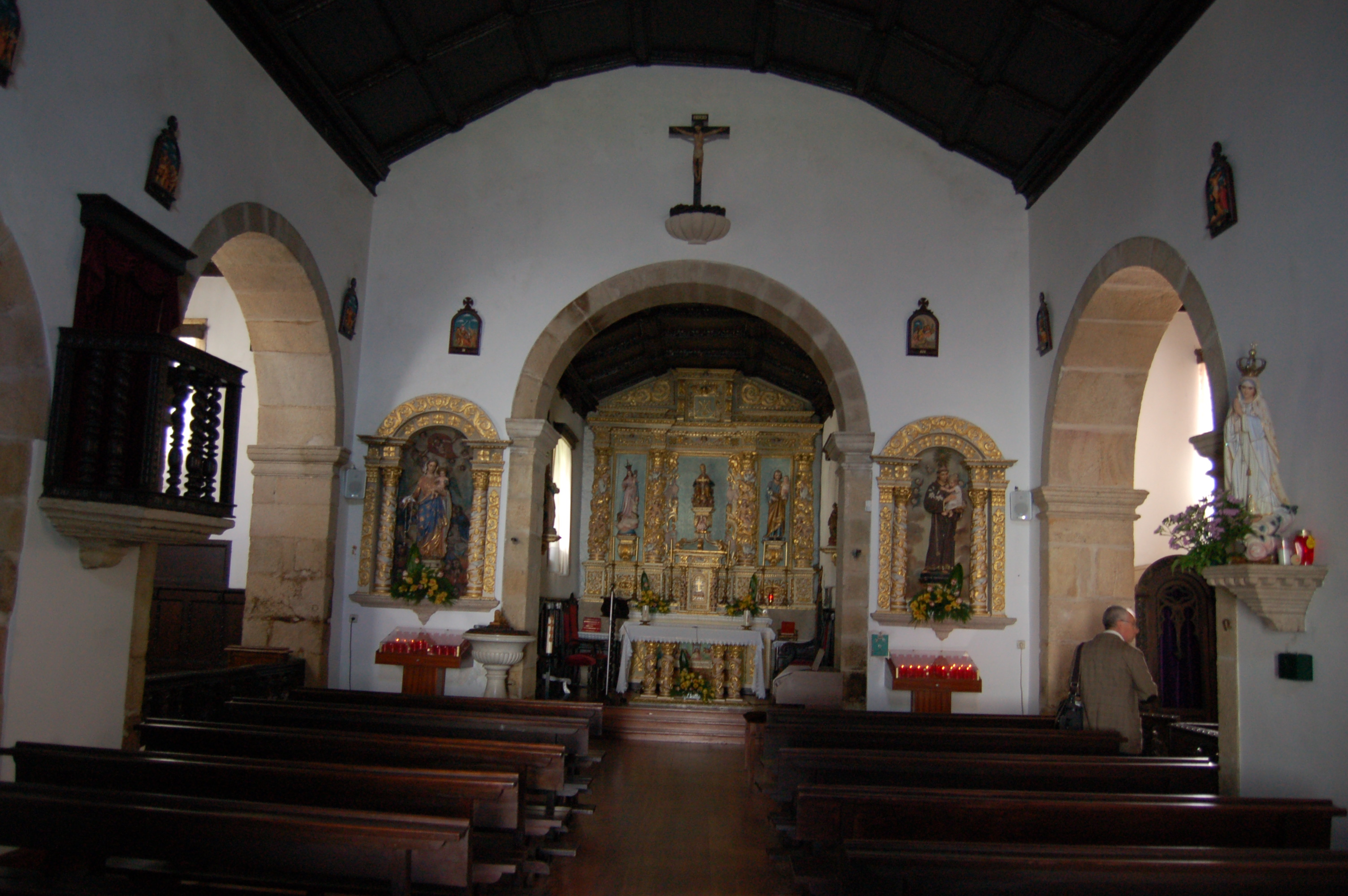 Interior da igrexa Matriz de Melgaço